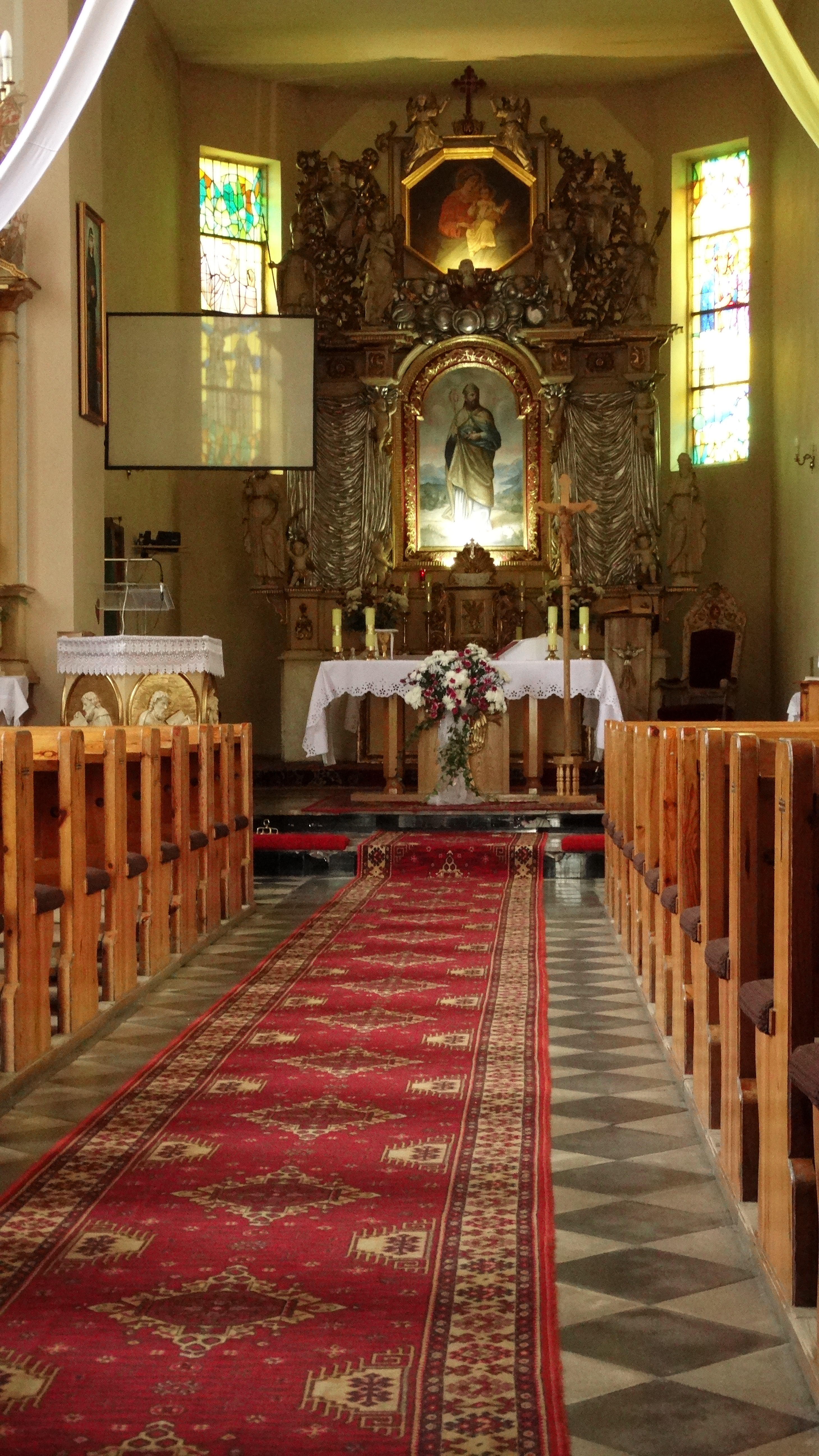 Szaradowo - nawa rzymskokatolickiego kościoła parafialnego pw. Św. Mikołaja Biskupa, 1836, 1886